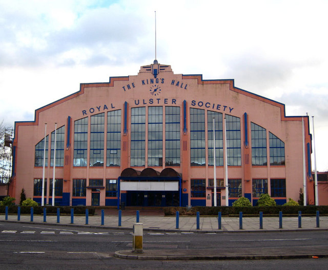 King's Hall, Belfast